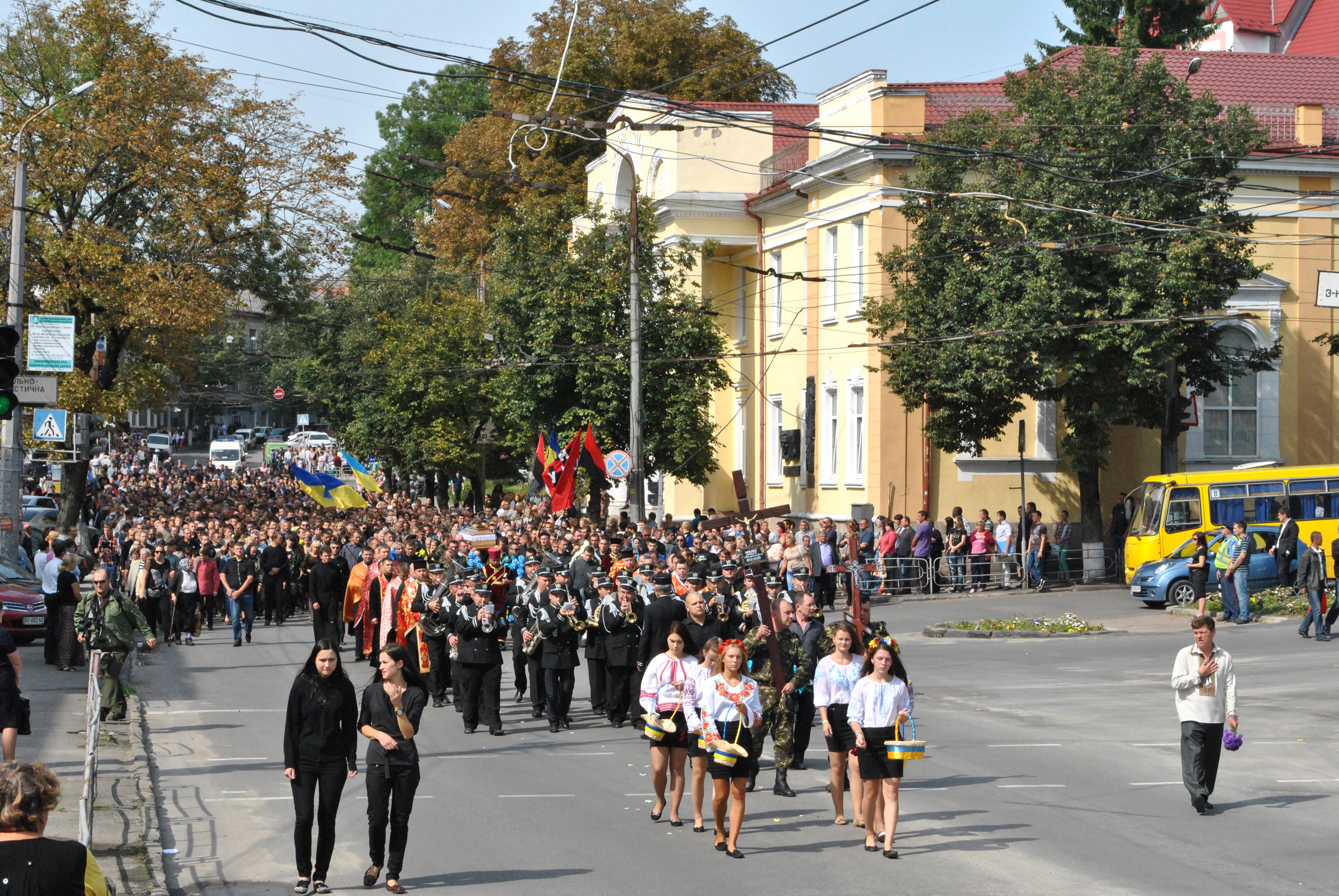 Похорон командира 2-го взводу 2-ї роти «Захід» 24-го батальйону територіальної оборони «Айдар», активного учасника Революції гідності Юркевича Андрія Михайловича. Похоронна процесія на вул. Князя Острозького, Тернопіль, 11 вересня 2014 року.